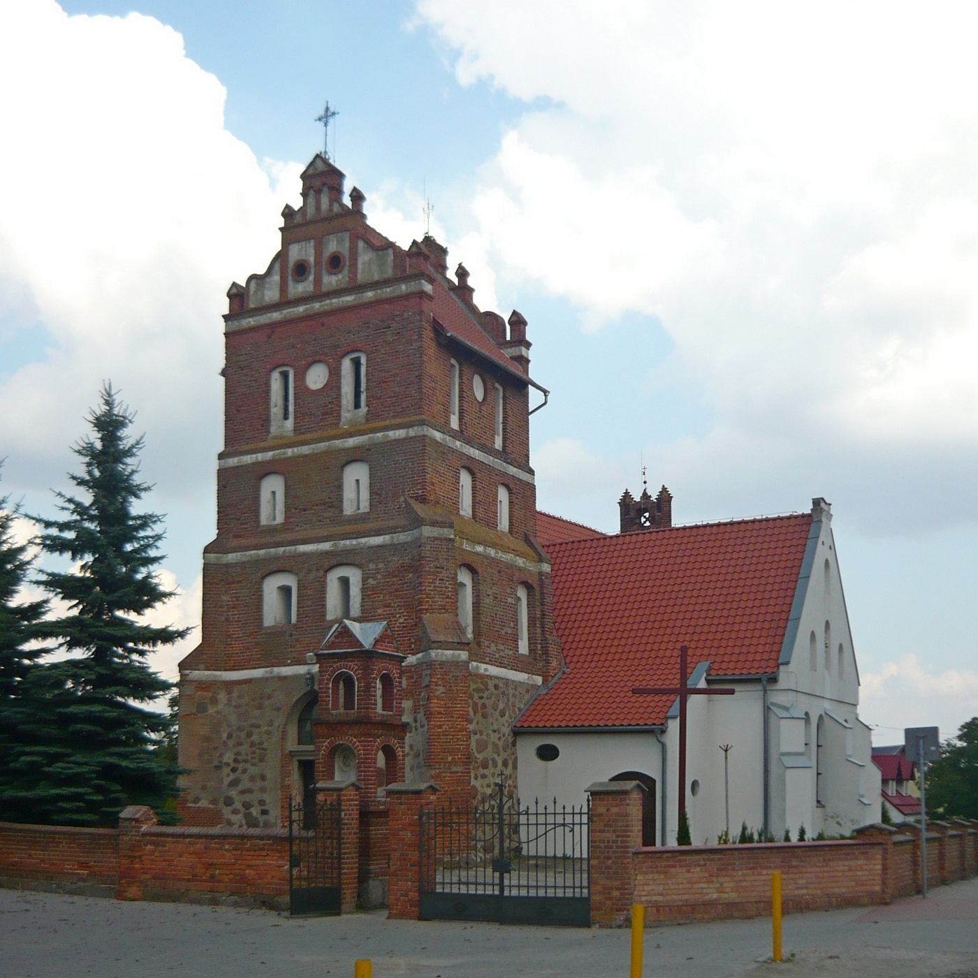 Kościół Zwiastowania NMP w Pączewie.